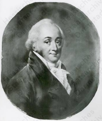 Hauke, Friedrich Karl Emanuel (1737-1810) / Porträt, Brustbild in Medaillon, 1806.